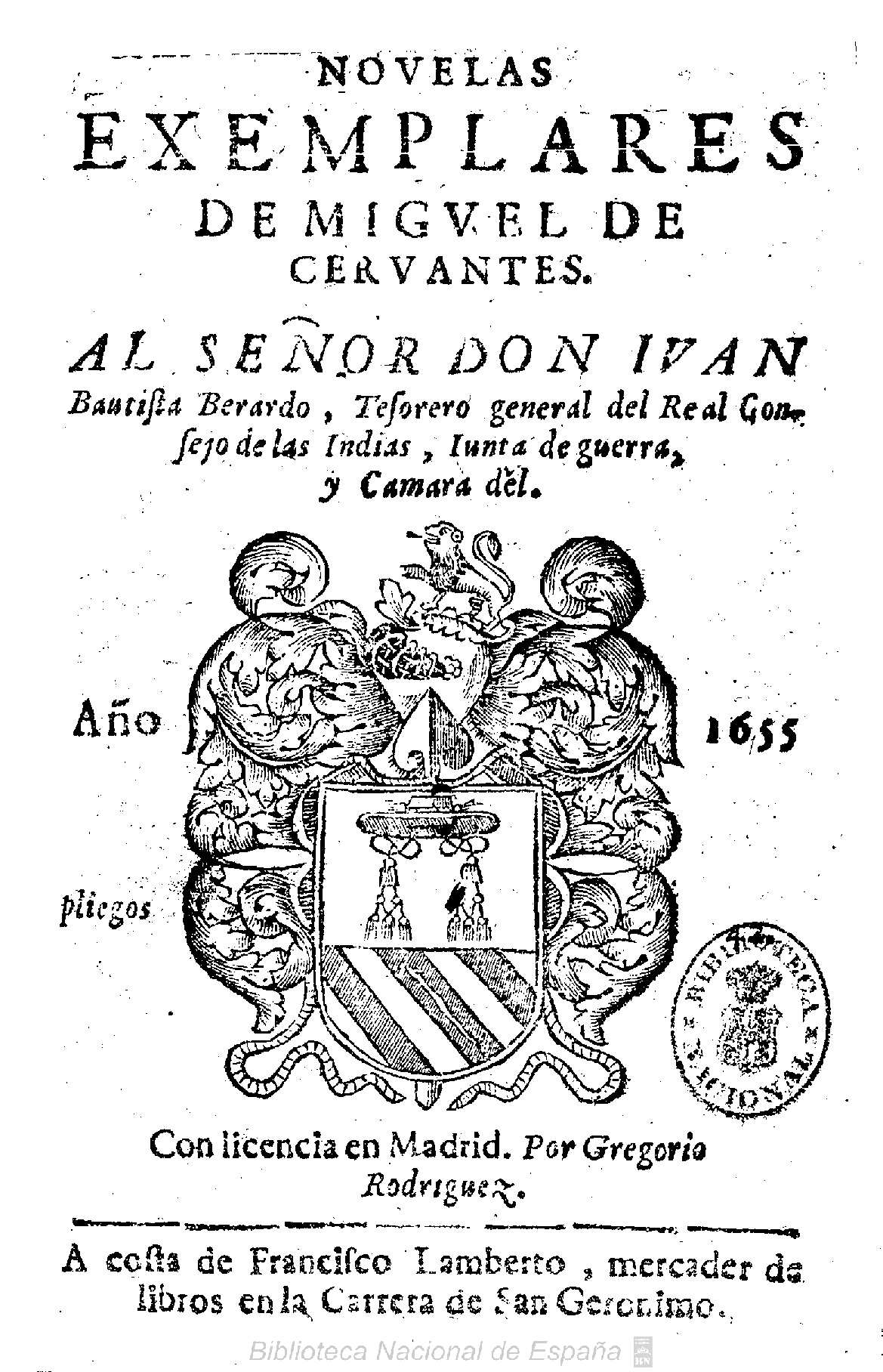 Nouelas exemplares de Miguel de Ceruantes ... Autor: Cervantes Saavedra, Miguel de (1547-1616) Fecha: 1656 Datos de edición: En Madrid por Gregorio Rodriguez a costa de Francisco Lamberto, mercader de libros ...